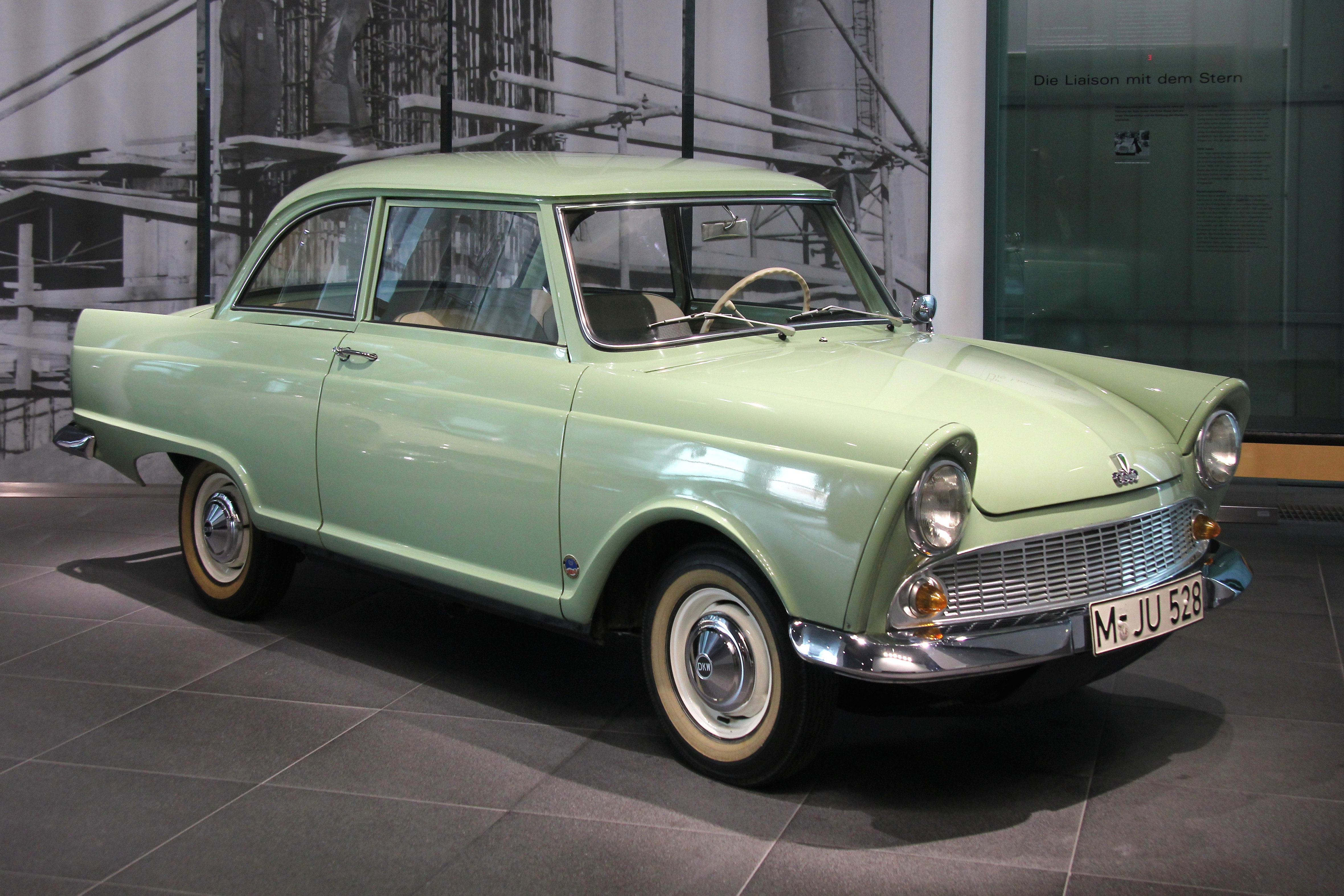 DKW Junior im museum mobile in Ingolstadt. Erste Ausführung von 1959 bis 1962